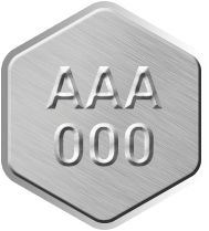 NanoID titaanist turvamärk.